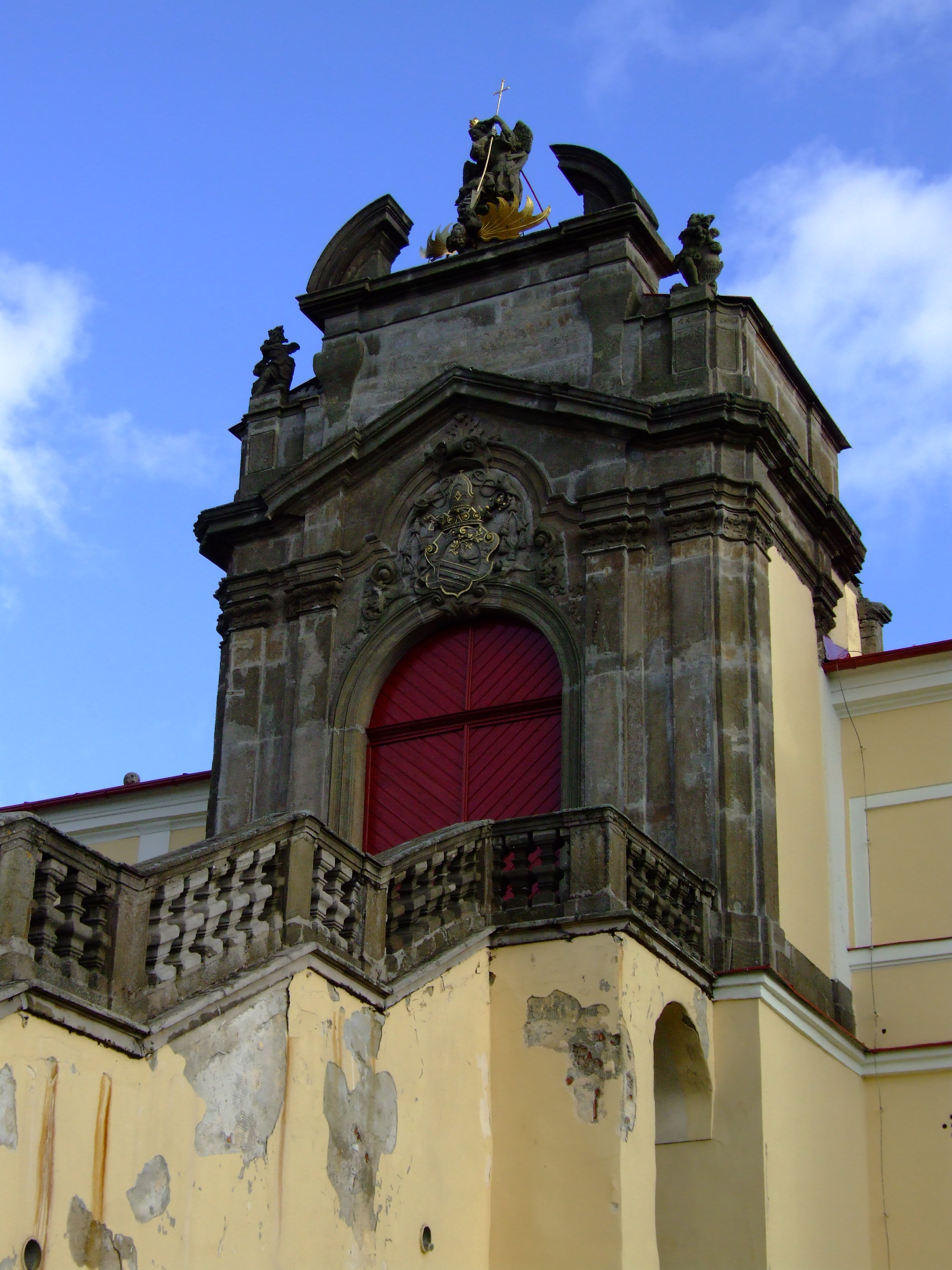 Vstupní portál kláštera na Hoře Matky Boží.